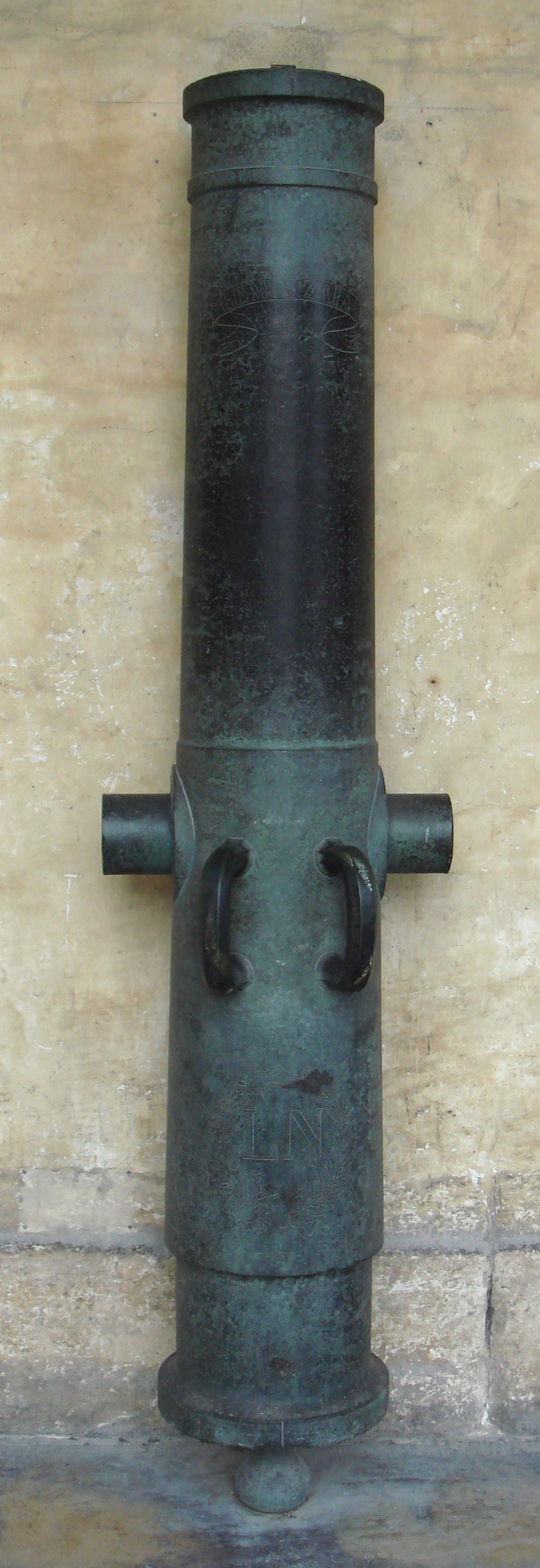 Obusier_de_15cm_systeme_Valee_1828_fondu_1852